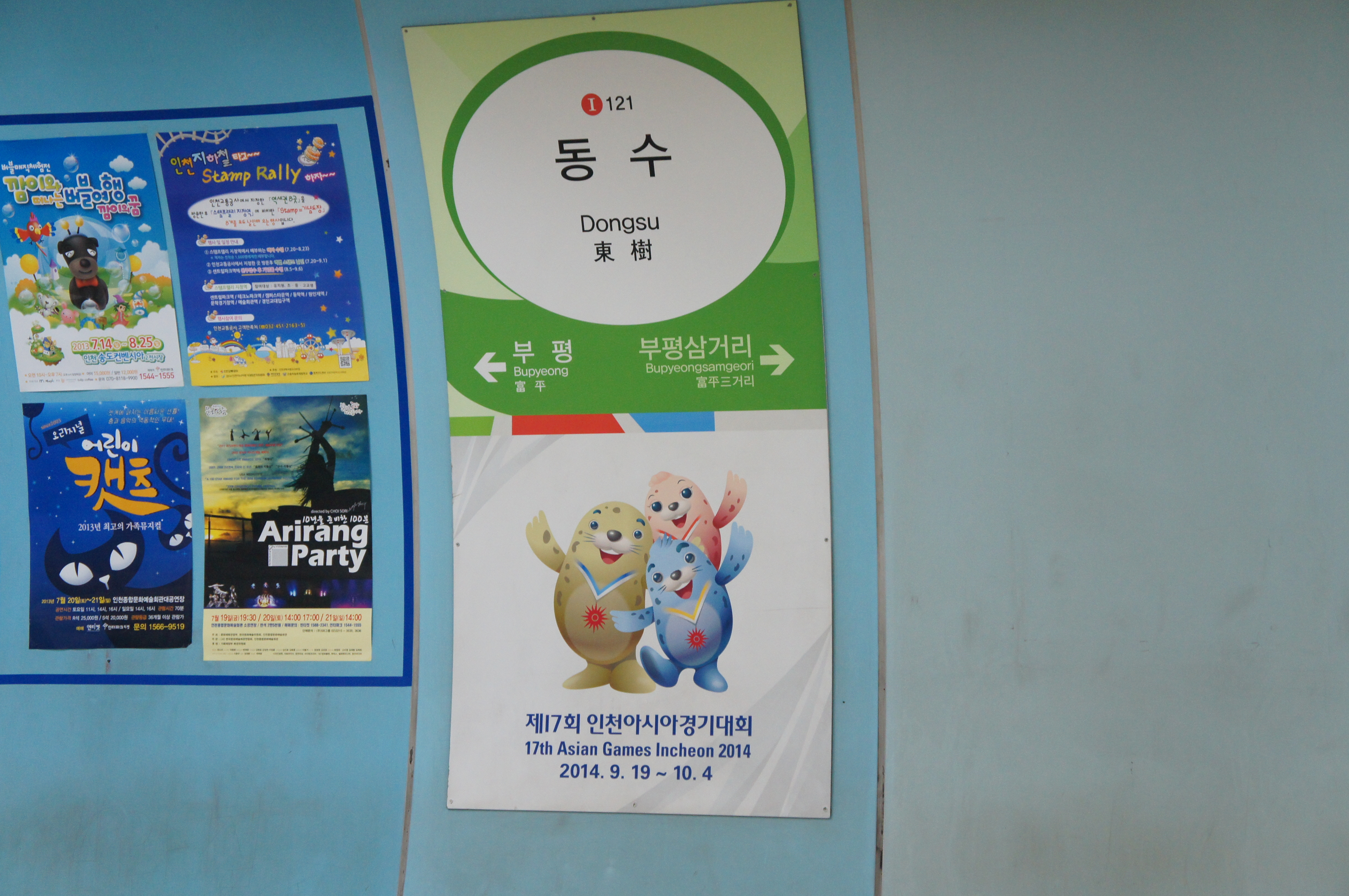 동수역 역명판